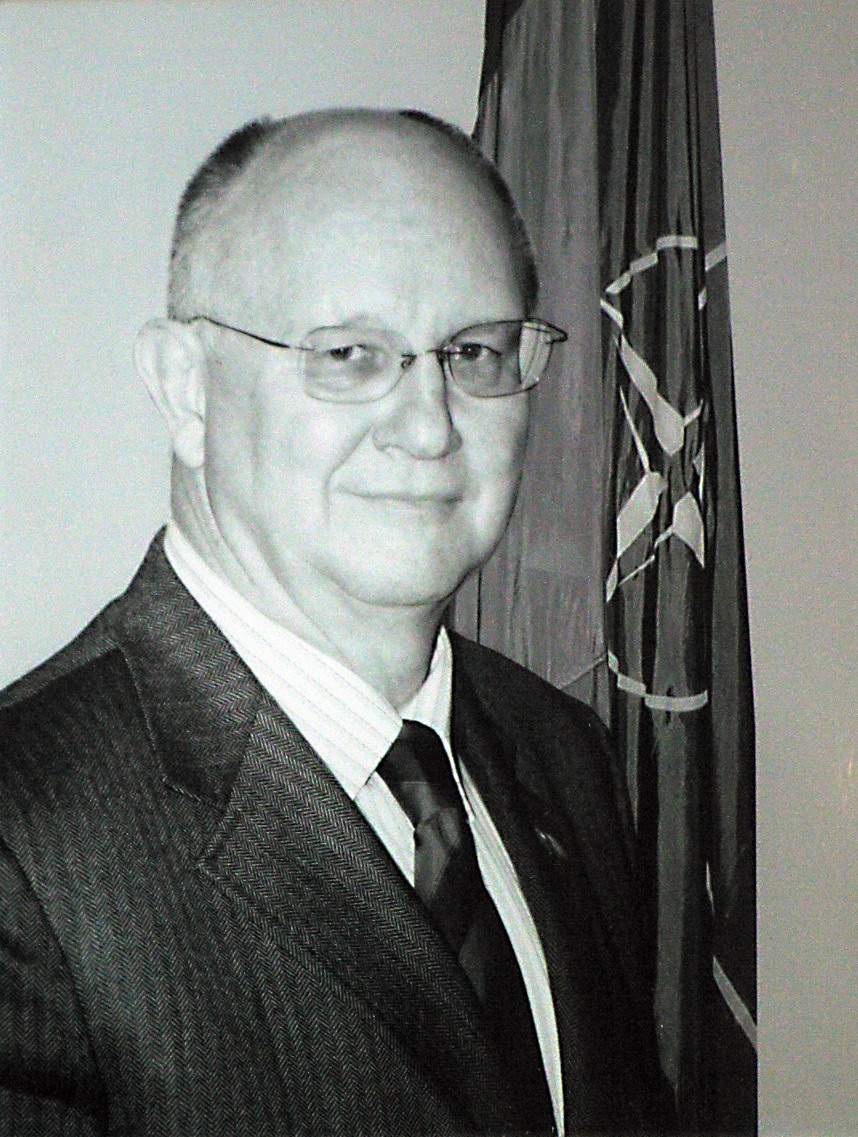 Ioan Mircea Pașcu (Romanian Minister of National Defence)